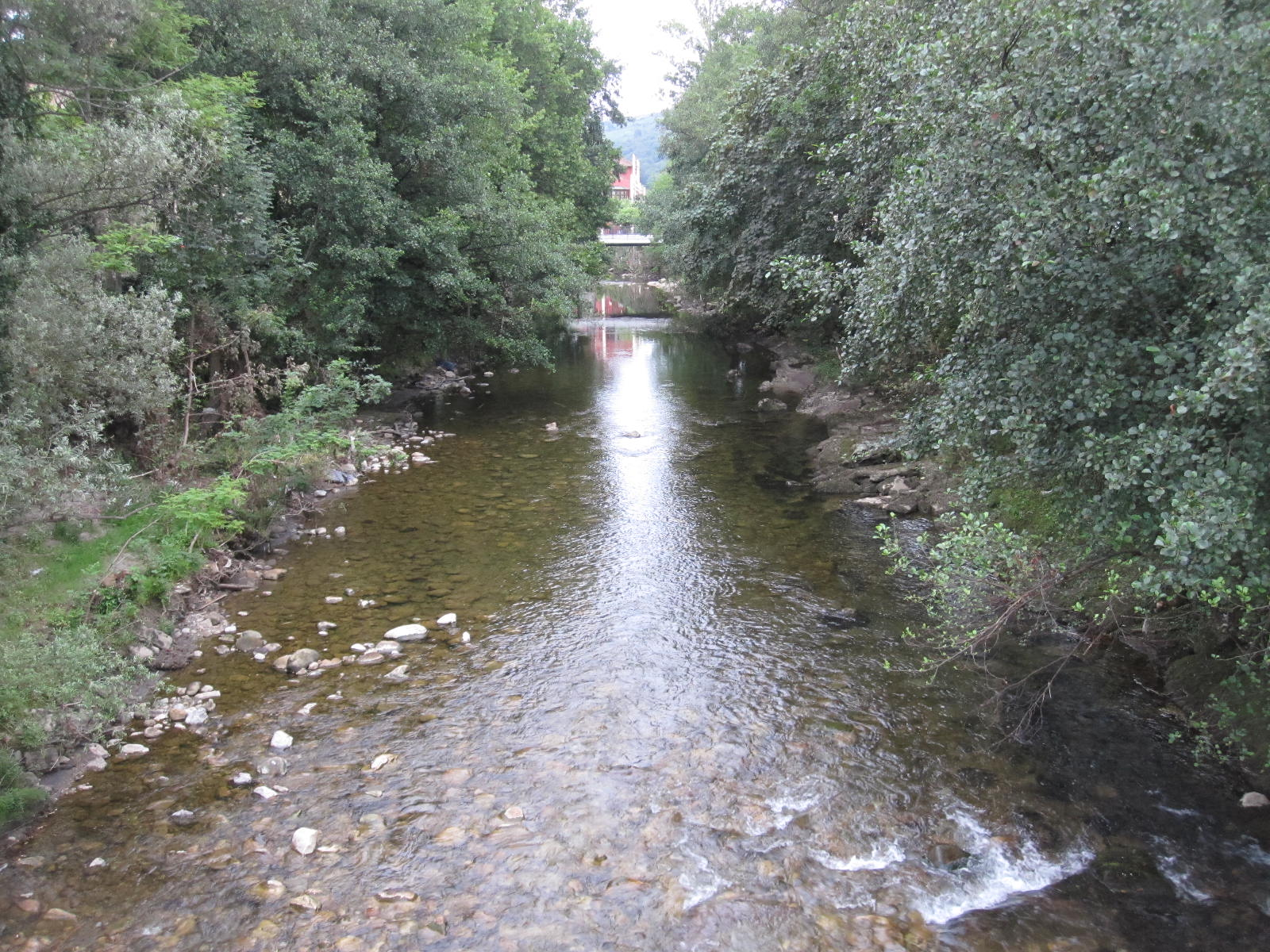 Río Trubia This is a photography of a Site of Community Importance in Spain with the ID: ES1200052. Natura2000 entry, EEA entry